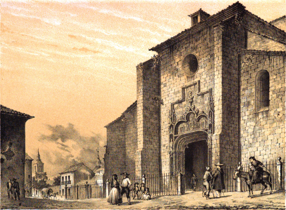 Fachada de la "Colegiata de Alcalá de Henares", actual Catedral-Magistral. Lámina dibujada del natural y litografiada por Francisco Javier Parcerisa en 1853, para la obra Recuerdos y bellezas de España: Castilla la Nueva.